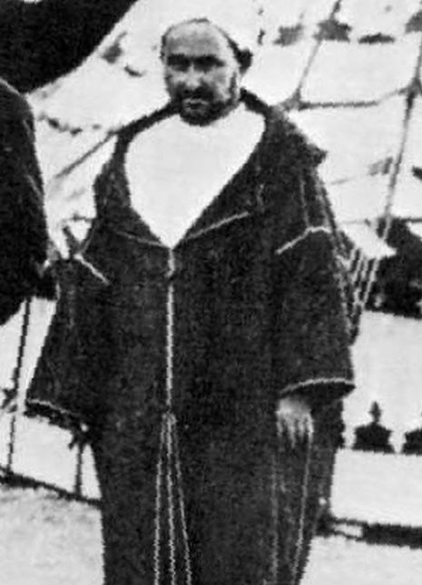 Abd el-Krim